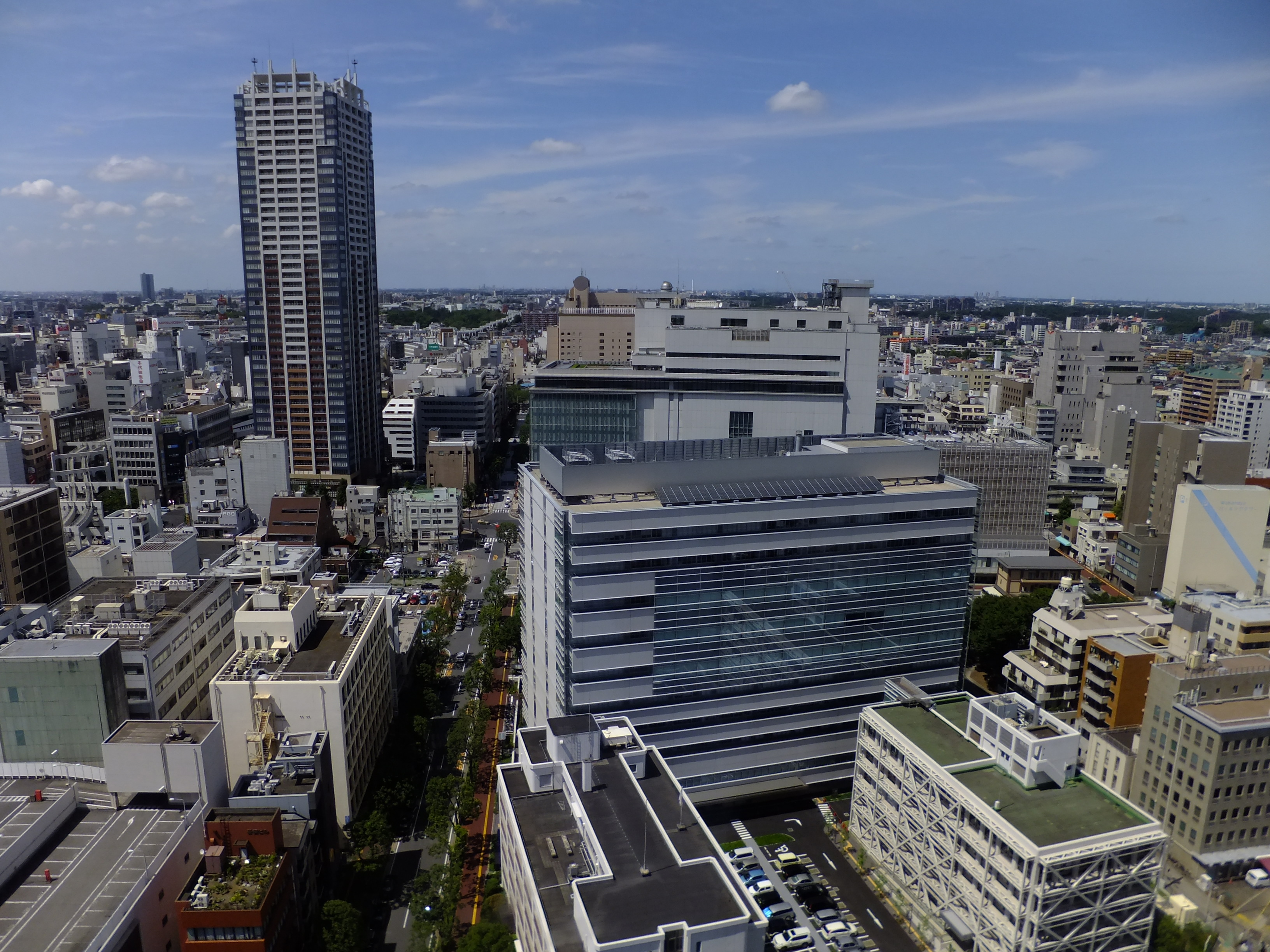 千葉県庁本庁舎からの眺め、千葉市中心街方向